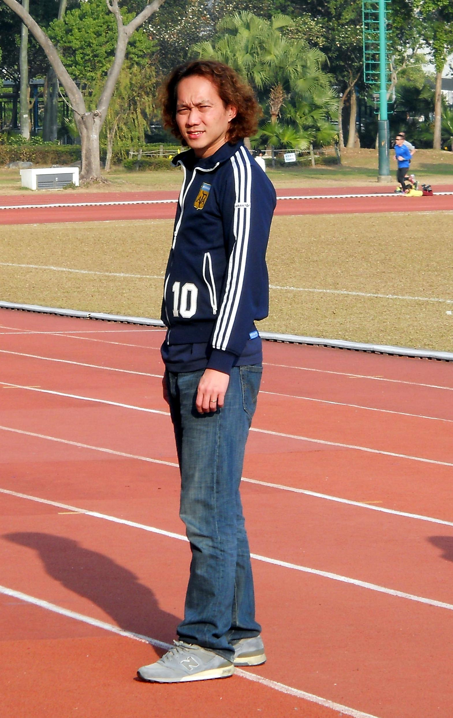 中文（香港）: 馬啓仁